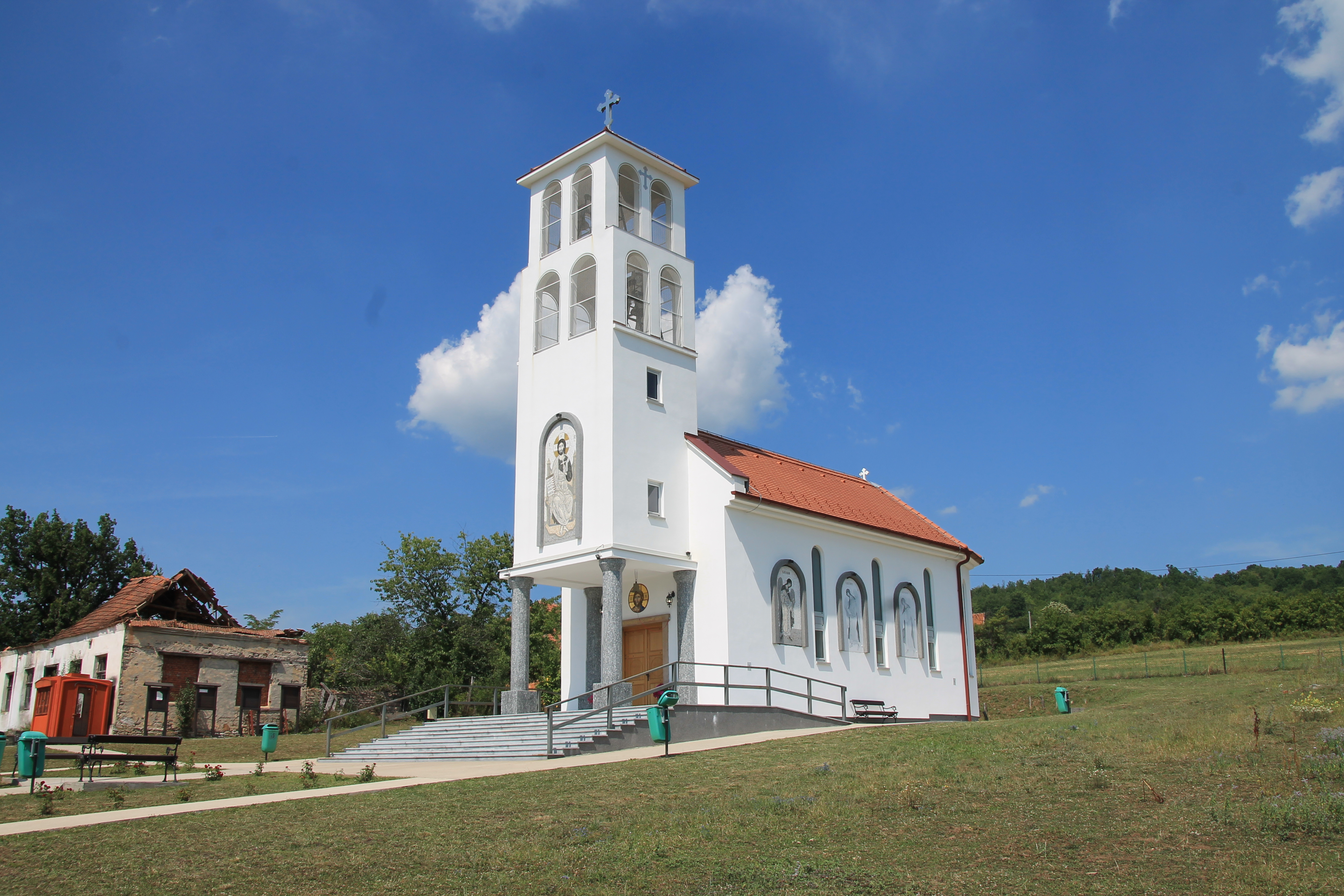 Crkva Vaznesenja Gospodnjeg (Kamenica)